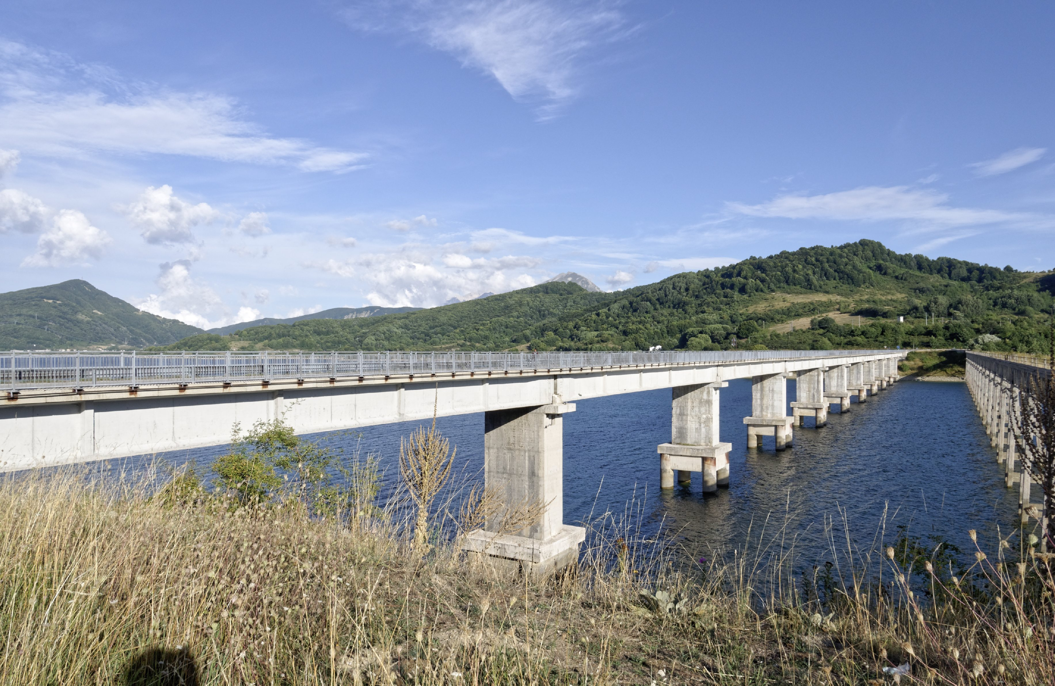 Lago di Campotosto 2015 Dieses Foto entstand in Zusammenarbeit mit Stadtbesichtigungen.de Die Seiten Stadtbesichtigungen.de, der dazugehörige Reise Blog sowie die Facebookseite: Stadtbesichtigungen Rom dürfen dieses Bild für Ihre Veröffentlichungen ohne den Hinweis auf Wikipedia, Commons bzw der Lizenz verwenden. Die Verantwortlichen habe von mir (Ra Boe) die Originaldaten zur freien Verfügung übermittelt bekommen.